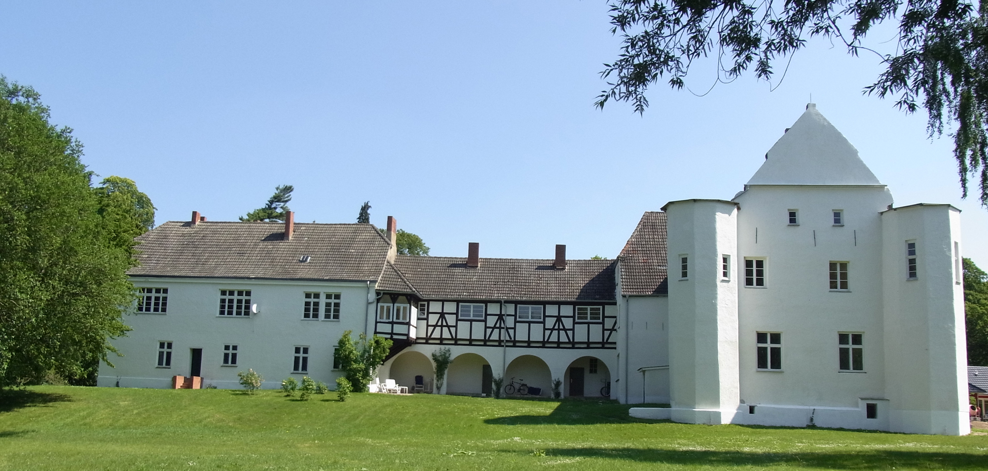 Schloss Klevenow Westseite